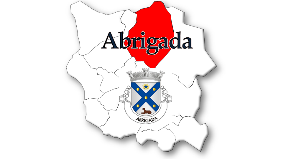 Evolução da População